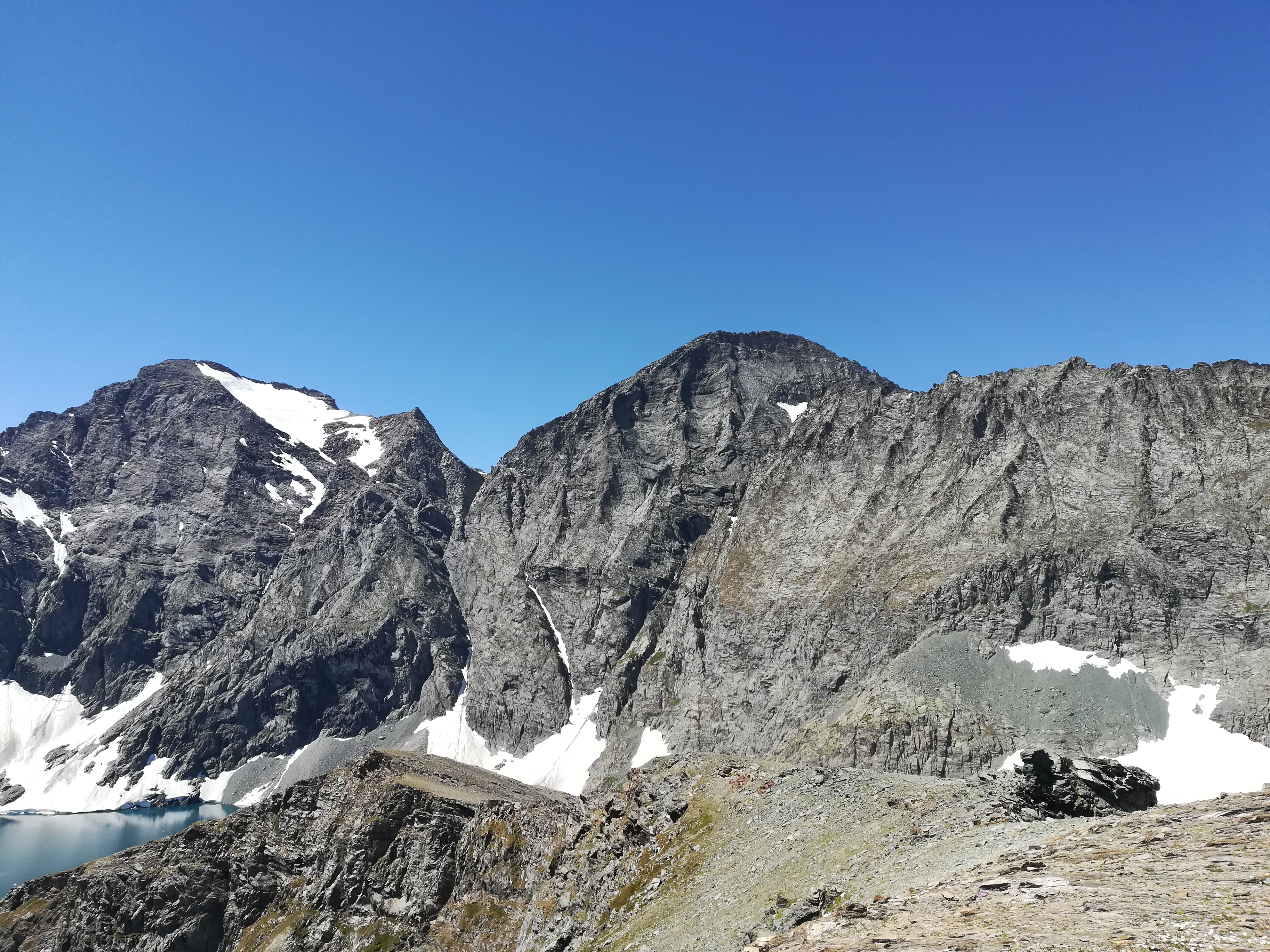 La Punta d'Arnas (al centro), la Croce Rossa a sinistra con il ghiacciaio ed in basso il Lago della Rossa